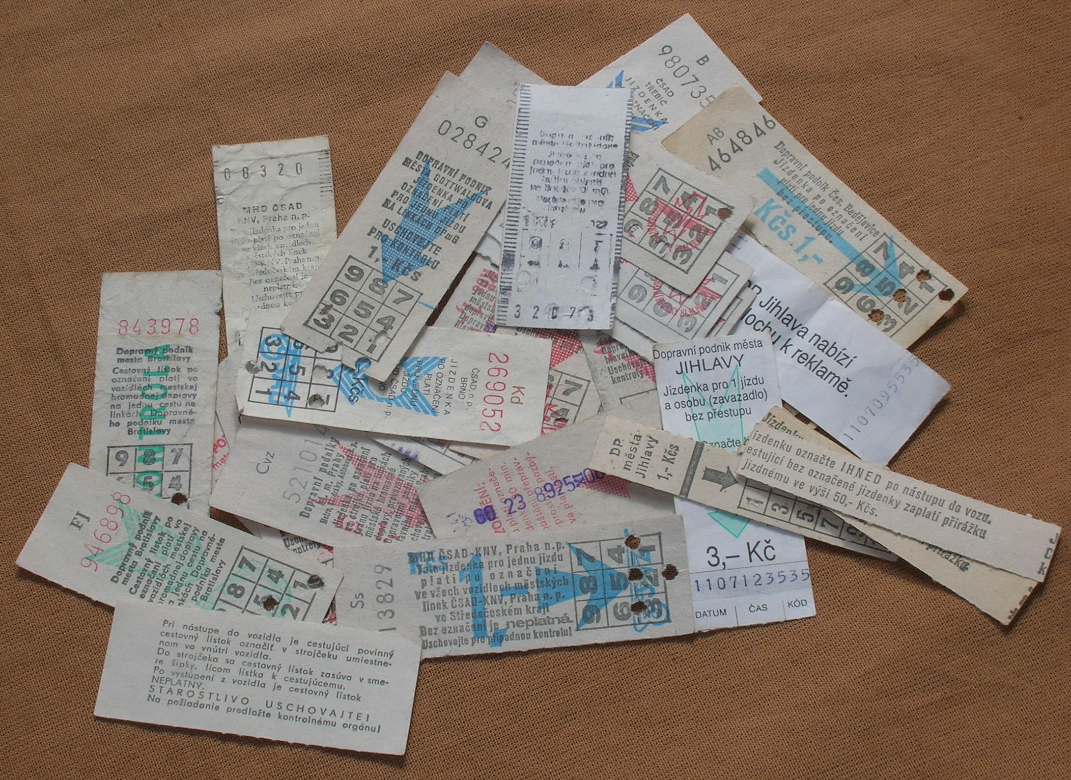 Old Czech (and Slovak) public transport tickets (from Prague, Bratislava, České Budějovice, Jihlava, Třebíč, Gottwaldov (Zlín), ČSAD Central Bohemian Region, ČSAD South Moravian Region ...)